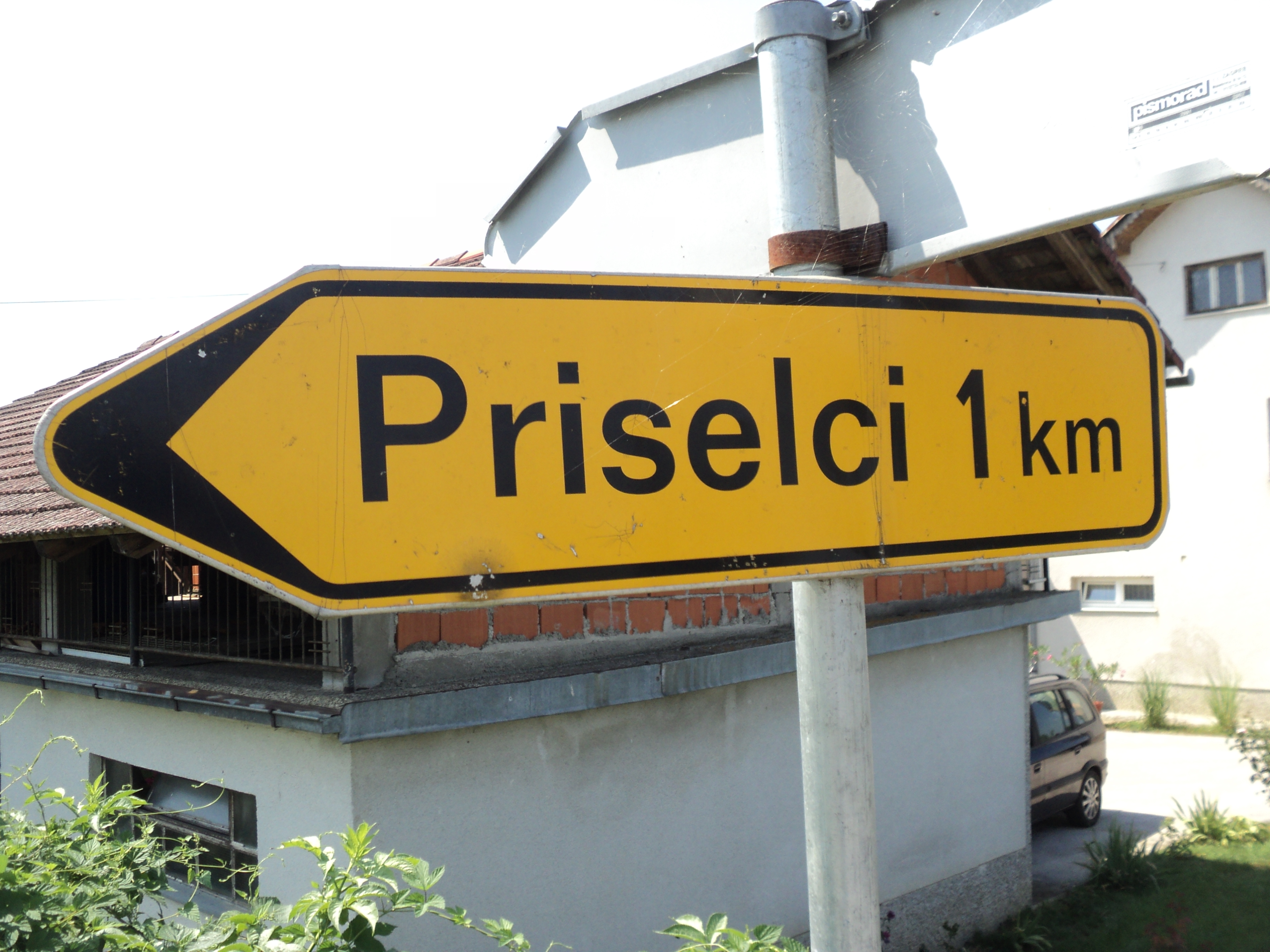 Putokaz Priselci 1 km